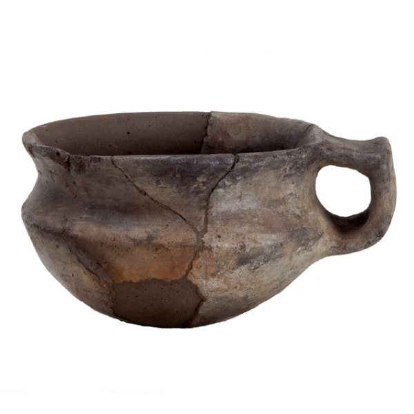 Corpo carenato. Orlo arrotondato; parete distinta concava; vasca emisferica; fondo ombelicato. Ansa nastriforme a gomito impostata all'orlo e in corrispondenza del diametro massimo. Colore: marrone-giallo chiaro.